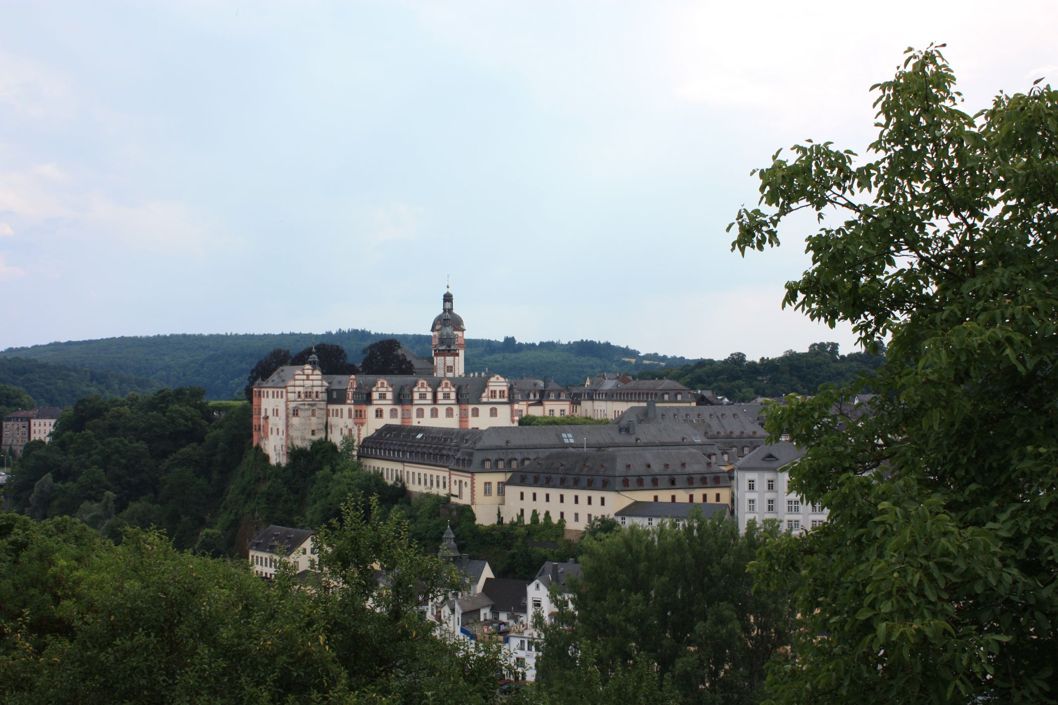 Gesamtansicht des Schloss Weilburg, Hessen Deutschland. Im Vordergrund der Lange Flügel